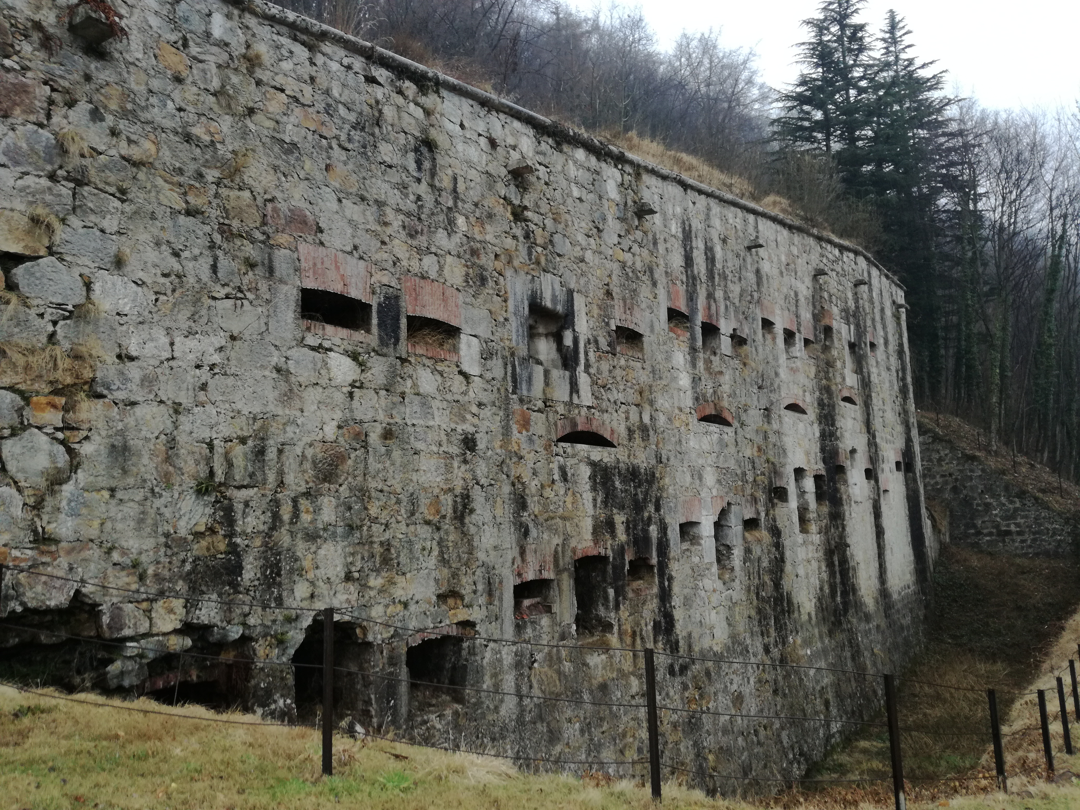 Straßensperre Bariola - Rückseite